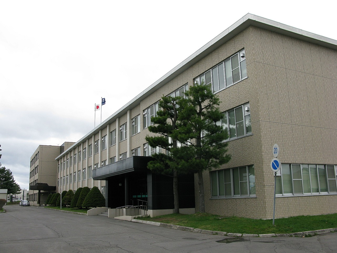 旭川工業高等専門学校（旭川高専）校舎